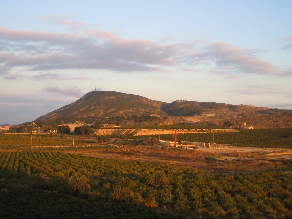 Imagen de la Sierra de Hurchillo, Orihuela, hecha desde los Saladares, Desamparados.